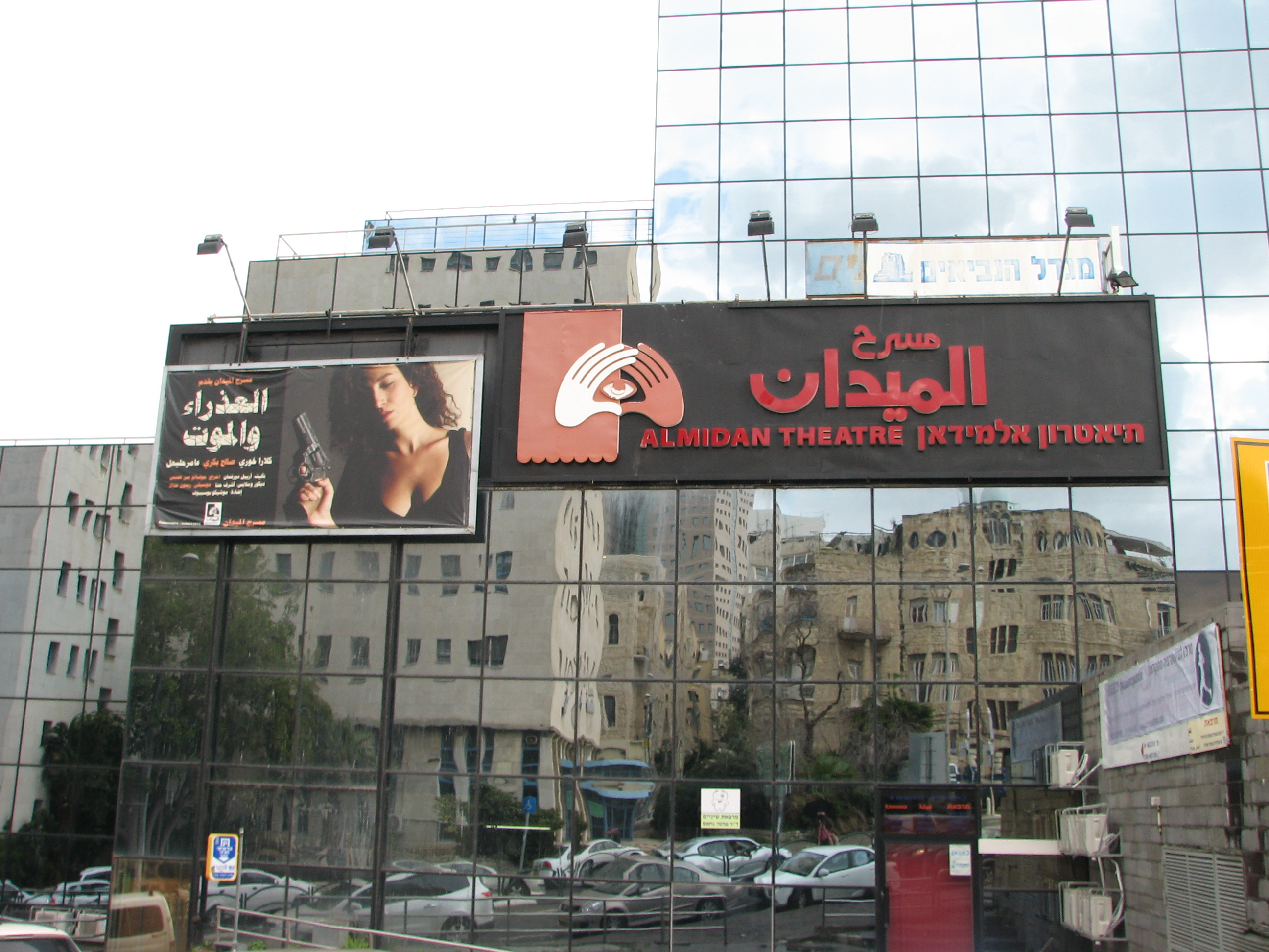 Almidan Theatre, an Arab theatre in Haifa, Israel תיאטרון אלמידאן, התיאטרון הערבי בחיפה, הוקם בשנת 1994 על ידי שרת החינוך והתרבות שולמית אלוני התיאטרון שוכן במגדל הנביאים בשכונת הדר הכרמל בצידו הצפוני של רחוב הנביאים פינת רחוב ח'ורי בחיפה ישראל שלט התיאטרון מעל מבנה מגדל הנביאים, צולם מרחוב ח'ורי פינת הנביאים